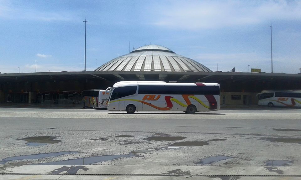 Unidad Scania Irizar i6 de Autobuses Unidos AU en la Terminal TAPO.